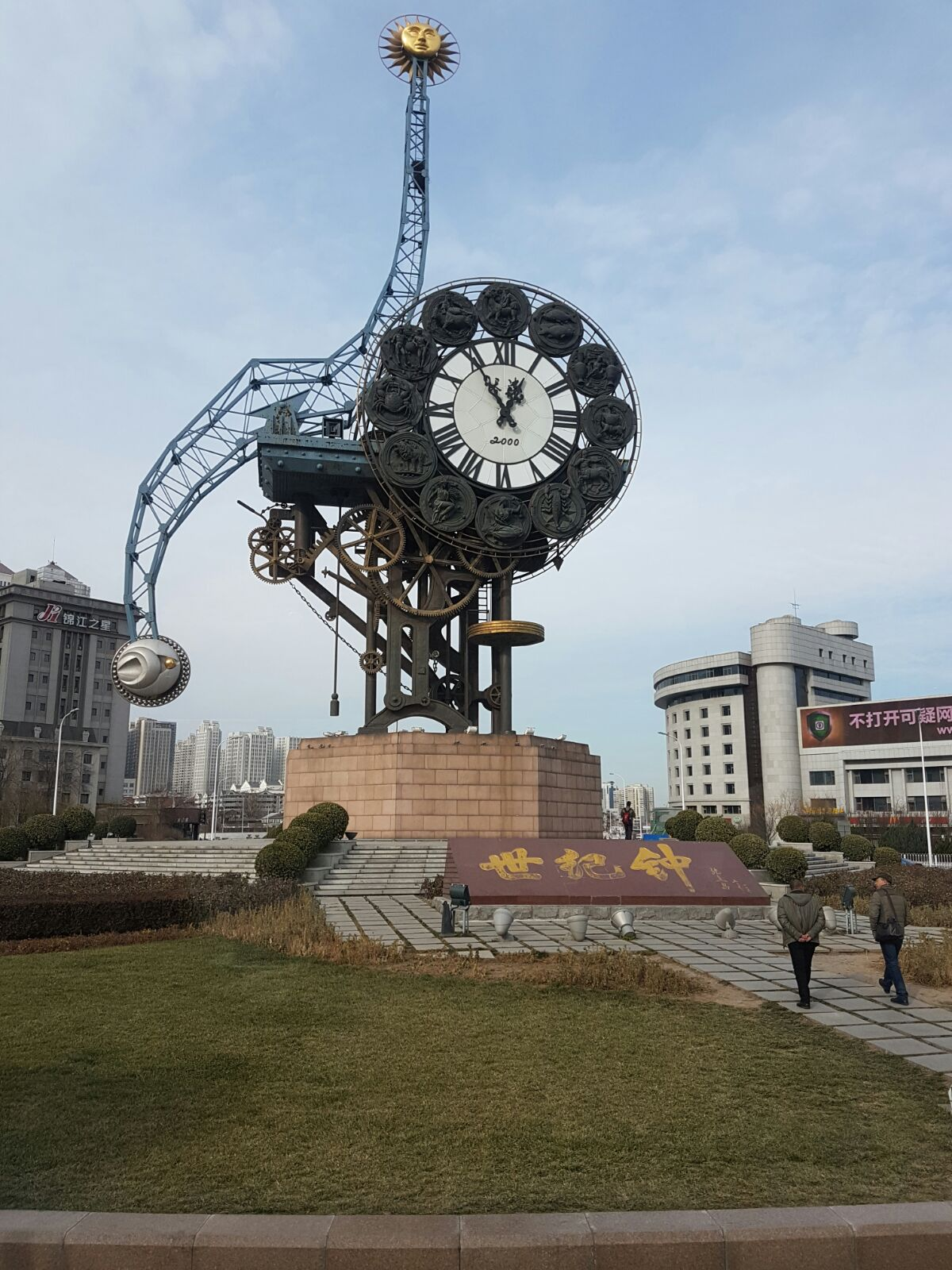 Jam abad ke Tianjin